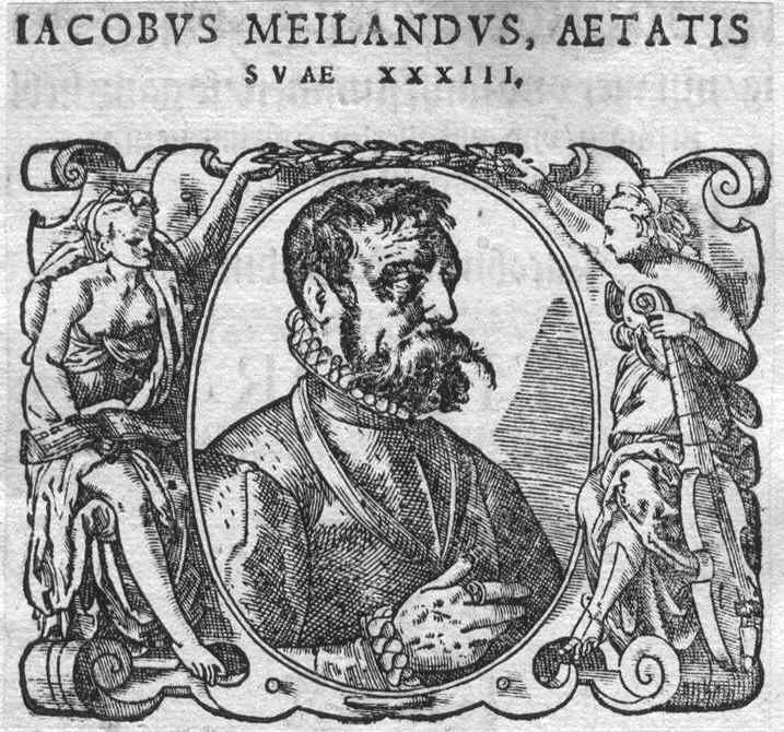 Jakob Meiland (1542–1577)